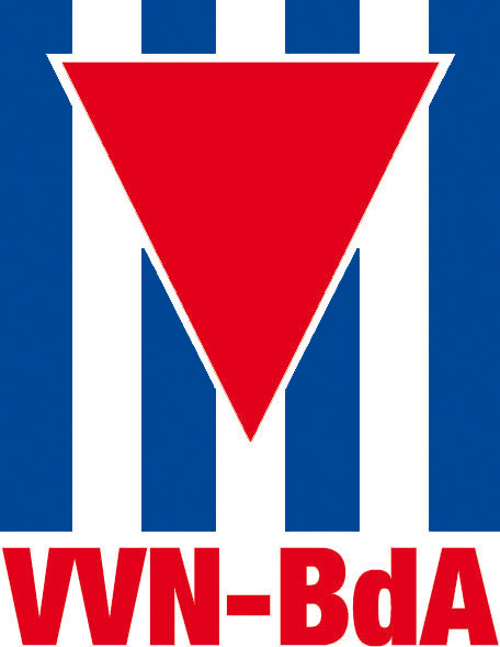 Das derzeitige Logo der VVN-BdA.